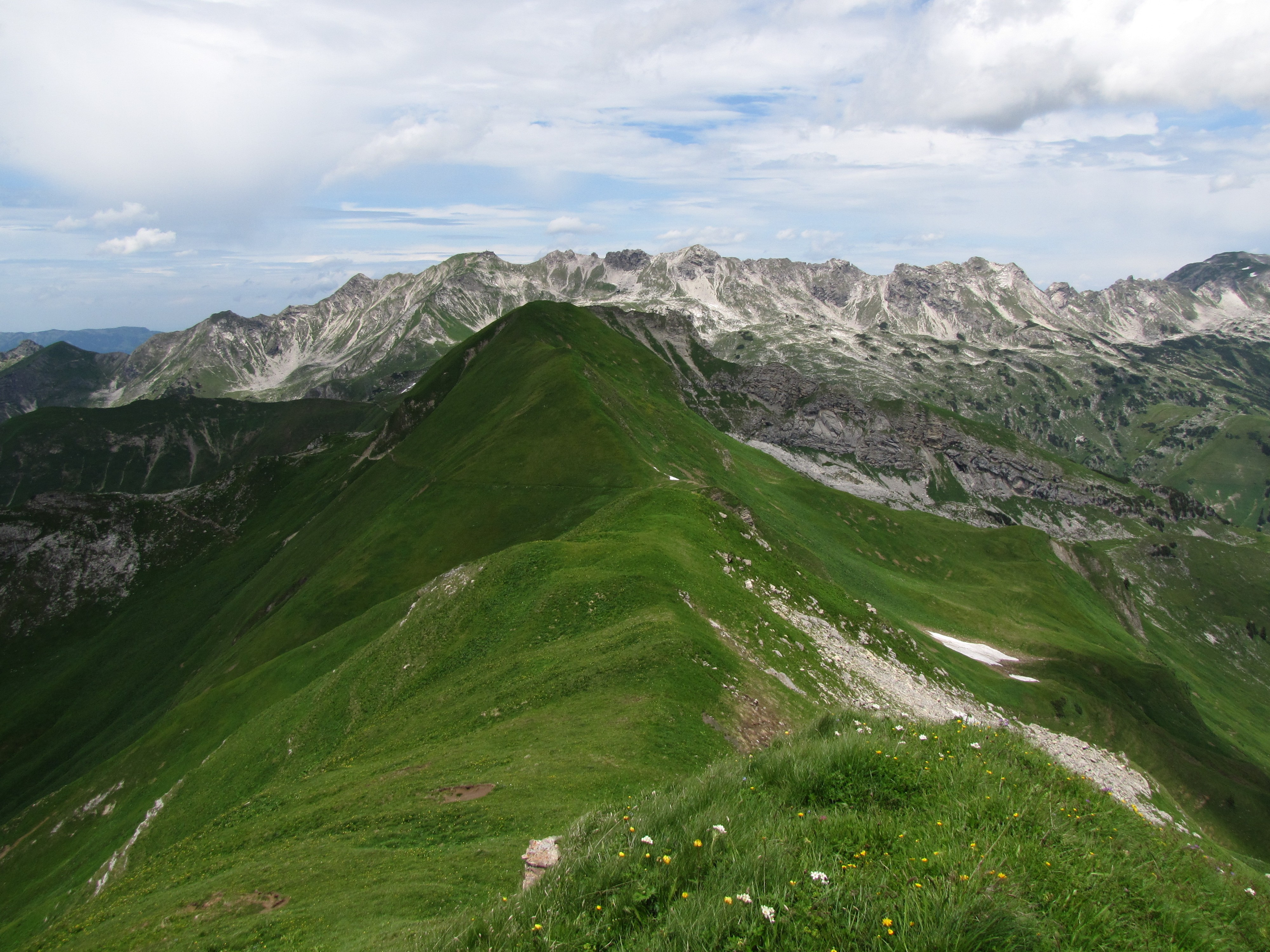 Blick vom Schochen (2100 m) nach Norden zum Kleinen Seekopf (2096 m) und dem Nordostgrat des Großen Seekopfs, dahinter der Gratverlauf zwischen Nebelhorn (2224 m) über Westlichen (2235 m) und Östlichen Wengenkopf (2207 m) zum Großen Daumen (2280 m).